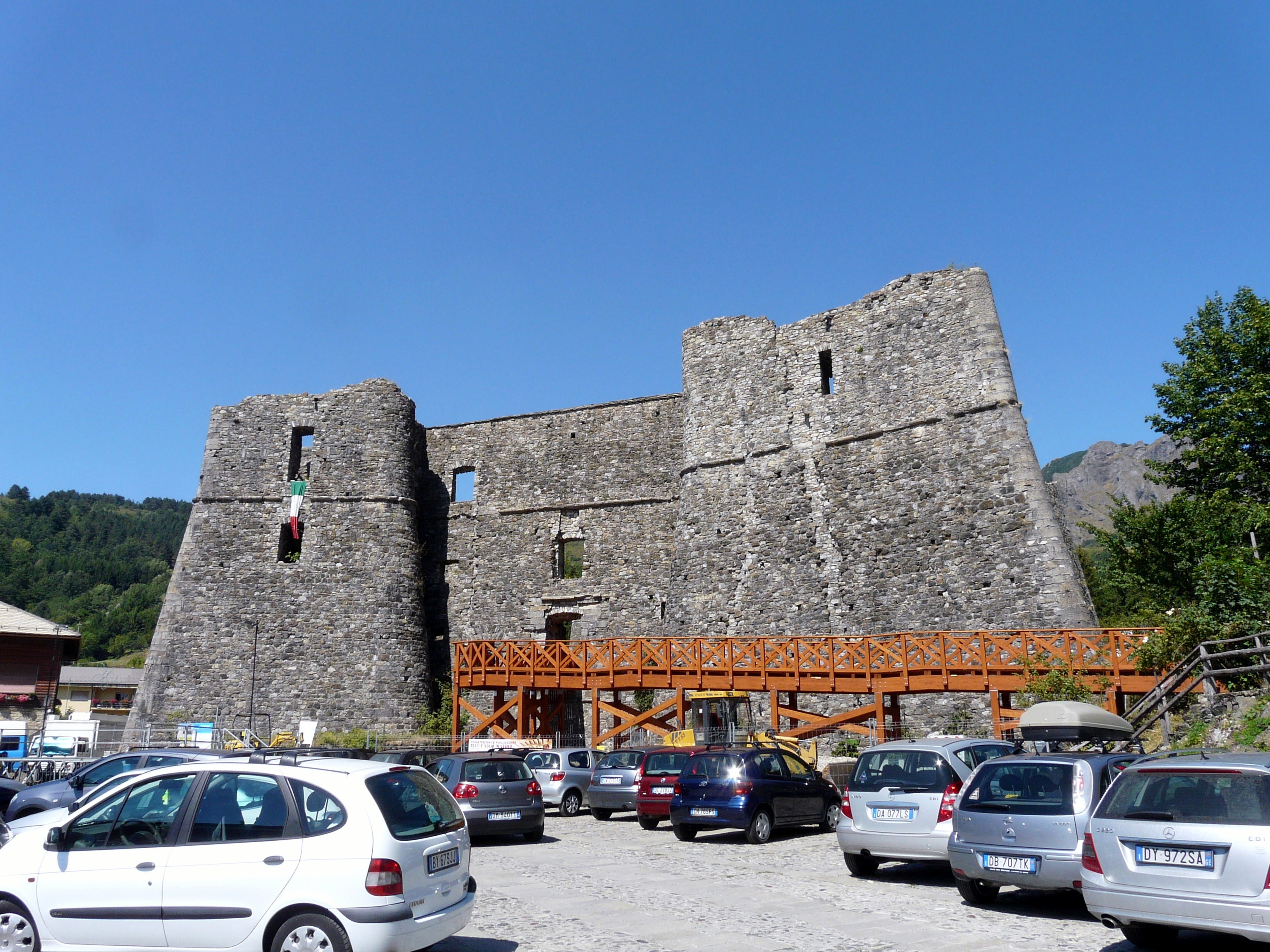 Serie di immagine del castello di Santo Stefano d'Aveto, Liguria, Italia